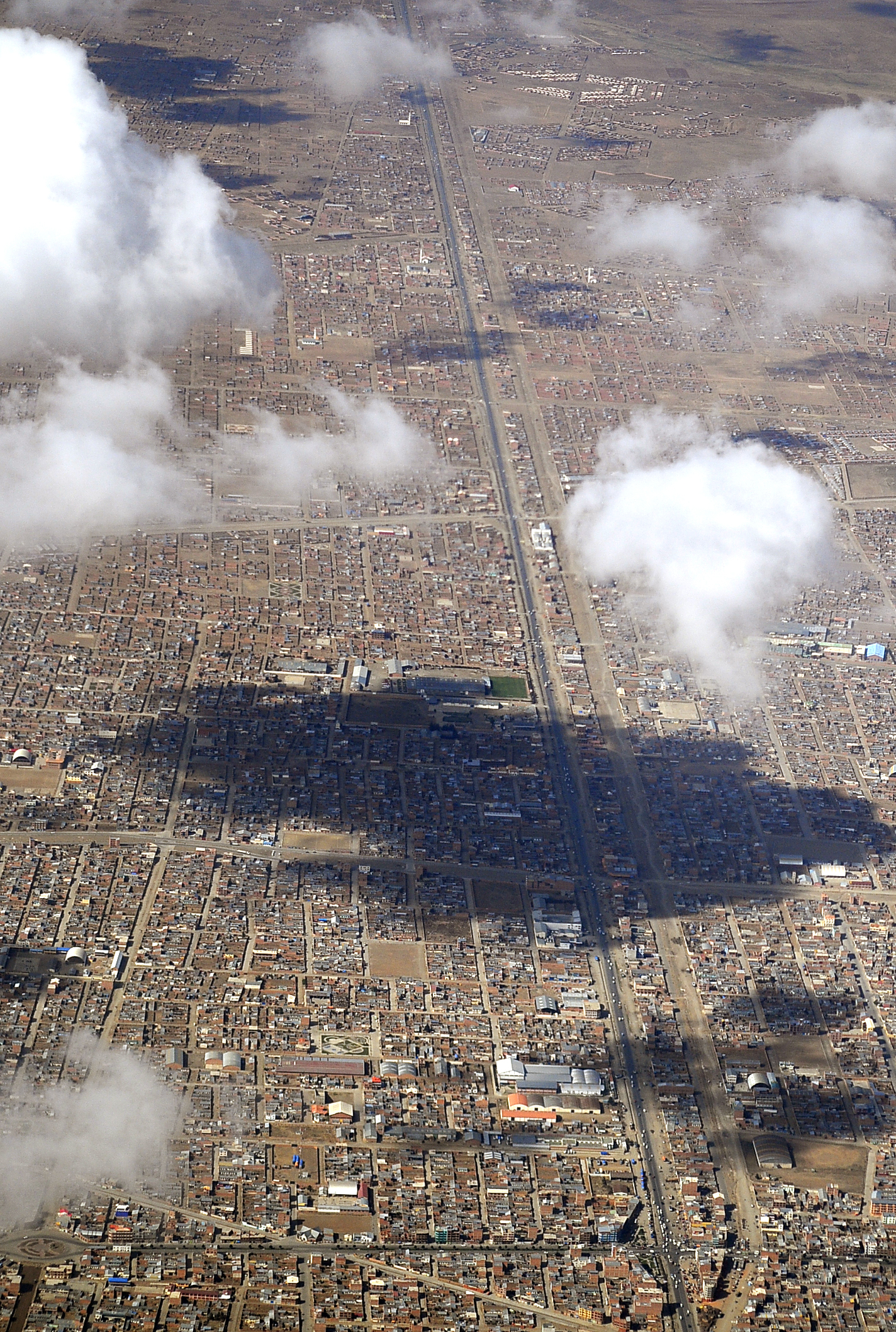 Vista aérea de El Alto, La Paz, Bolivia